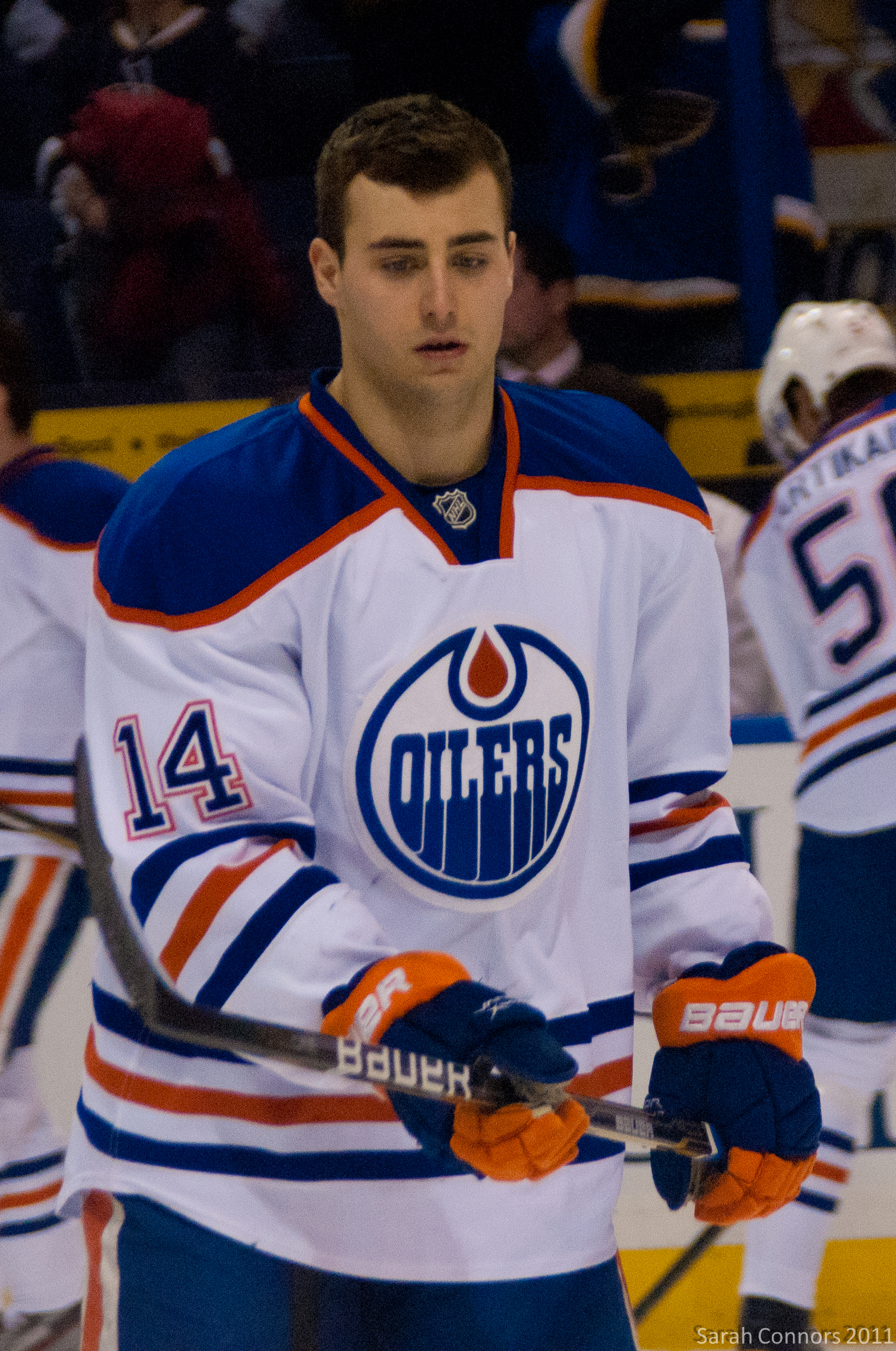 Jordan Eberle in 2012